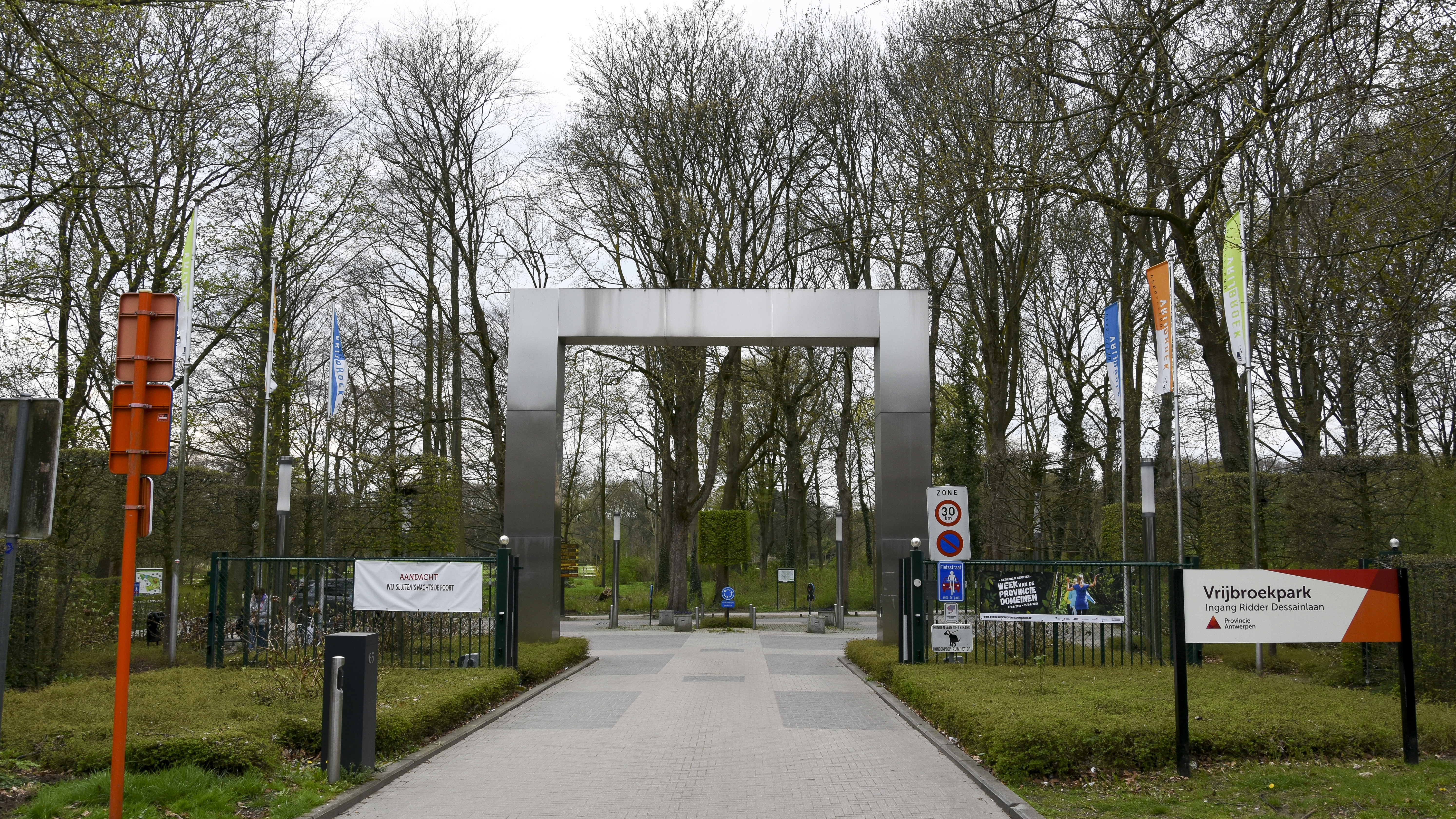 De ingang van het Vrijbroekpark te Mechelen aan de Ridder Dessainlaan